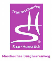 Wegmarkierung des Premiumwanderwegs "Masdascher Burgherrenweg" der "Traumschleife Saar-Hunsrück". Mastershausen, Deutschland